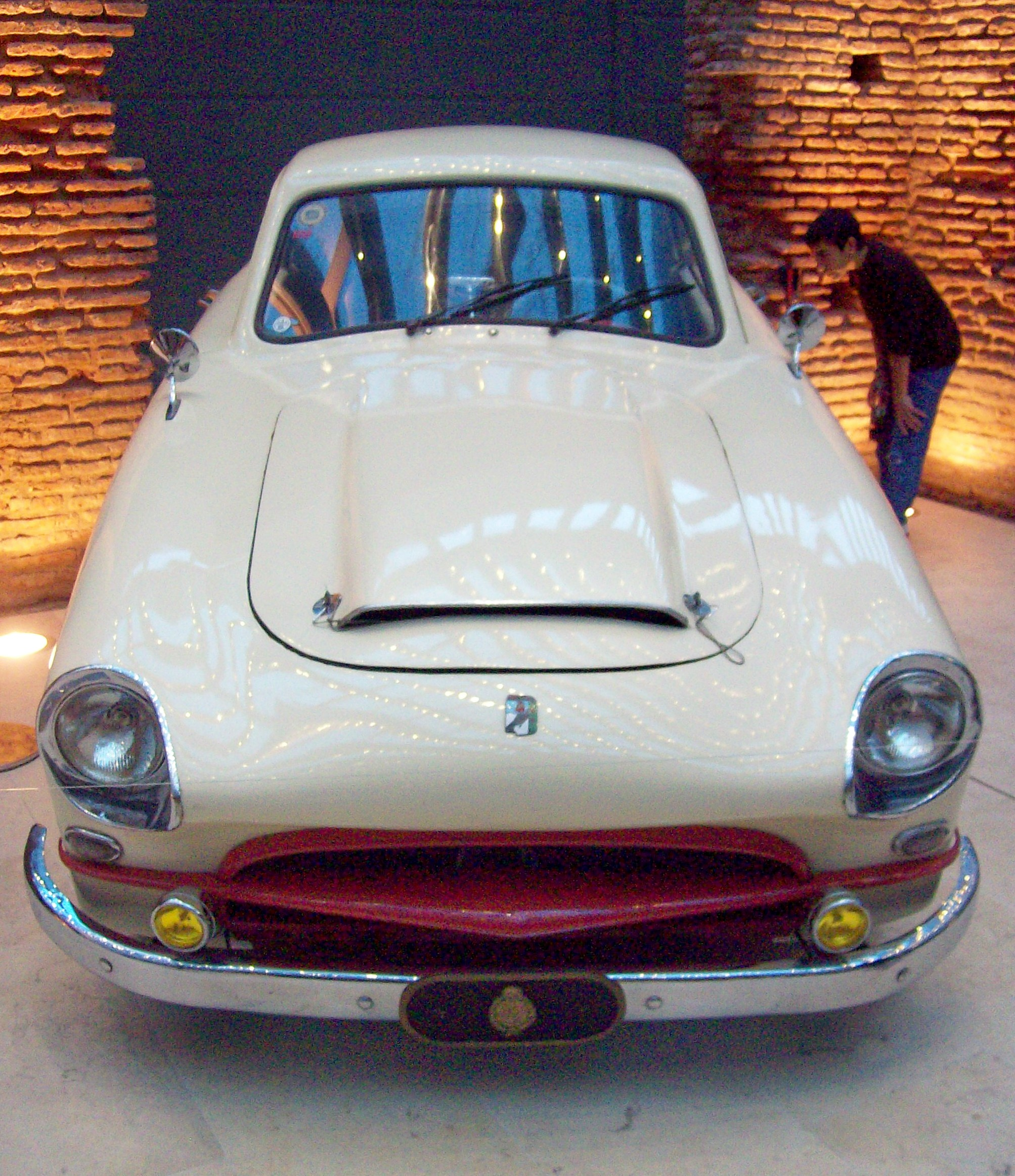 Un modelo Justicialista Gran Sport del año 1954 exhibido en el Museo del Bicentenario, Buenos Aires.